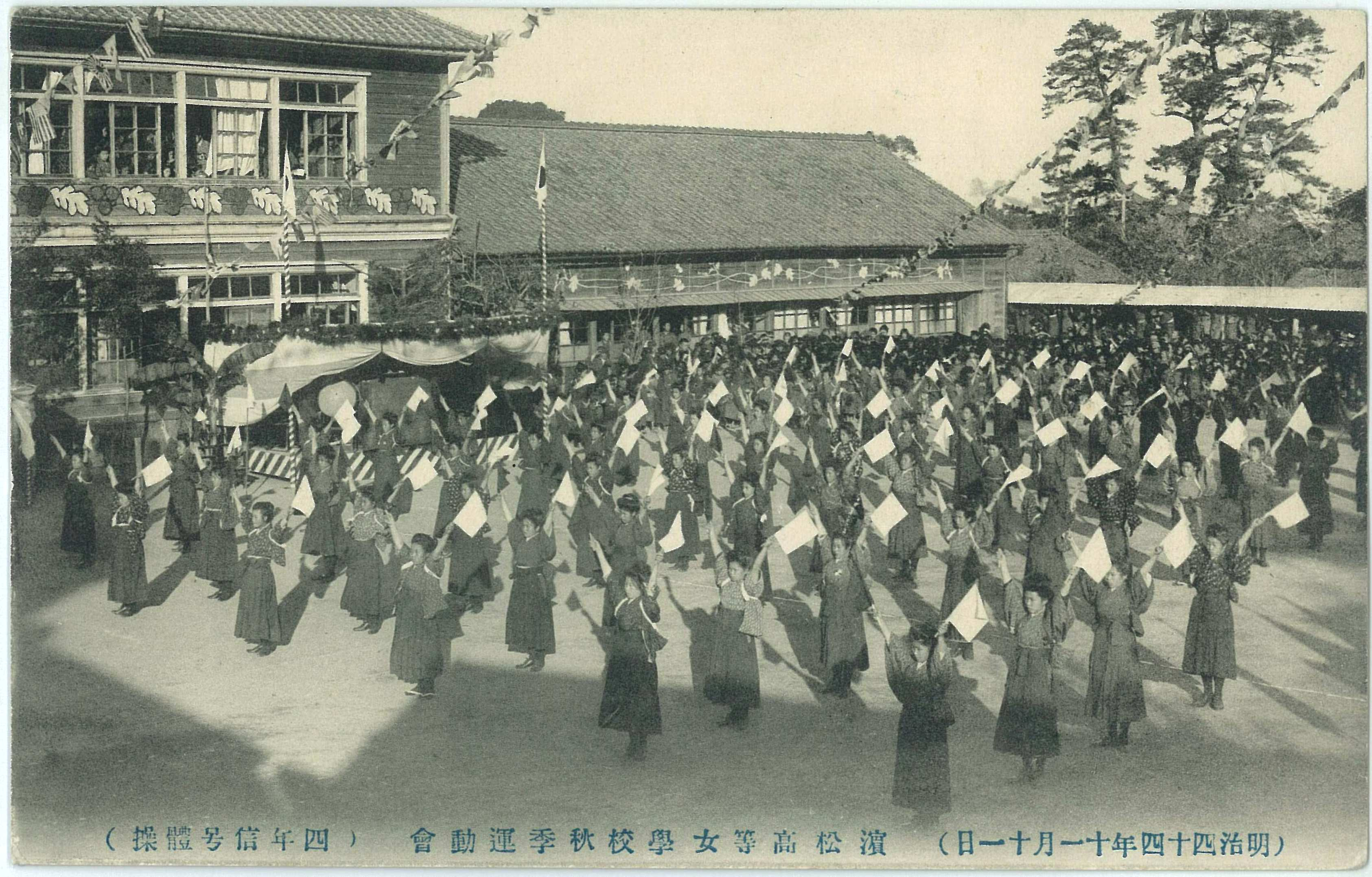 （明治四十四年十一月十一日） 濱松高等女學校秋季運動會 （四年信号體操） 静岡縣濱松町 松代馬冷 浜松市立浜松高等女学校 （現・浜松市立高等学校） 秋季運動会 4年・信号体操 （ハママツの「ハ」）